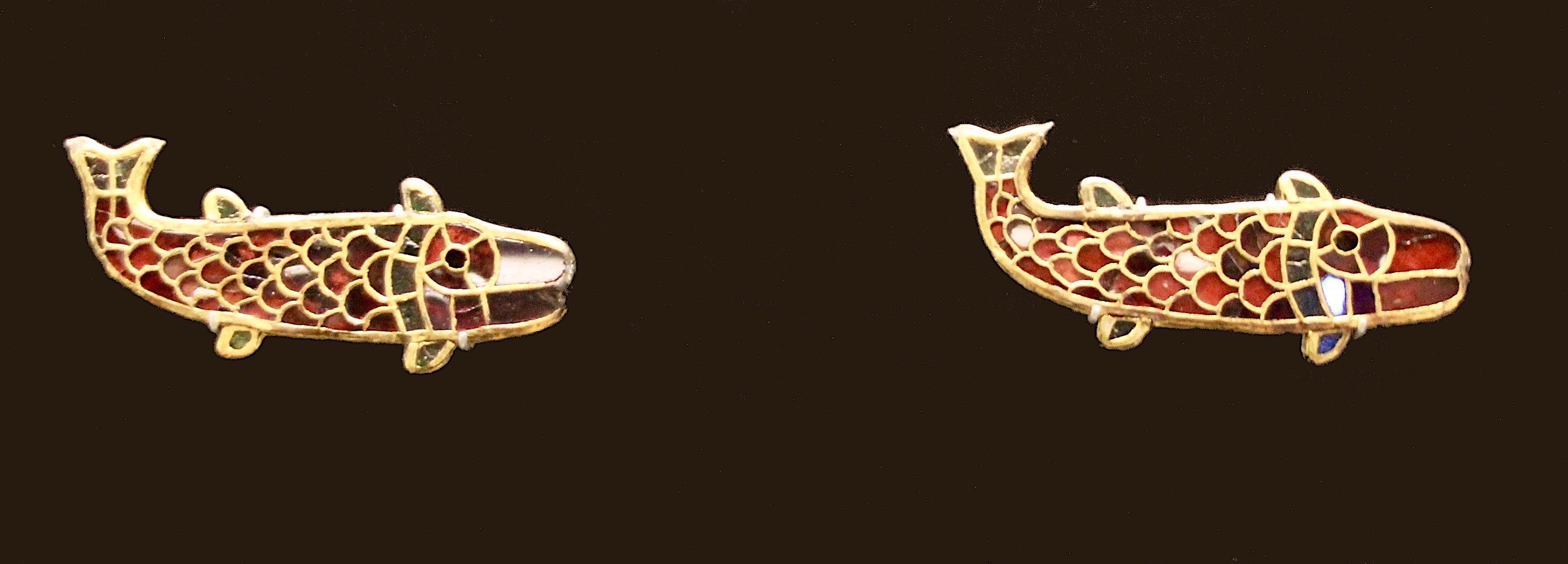 Fischfibelpaar aus dem 6. Jdh. aus dem Grabfeld «Im Füchsli» in Bülach, gefunden 1927 zusammen mit der Bülacher Fibel. Ausgestellt im Landesmuseum Zürich.